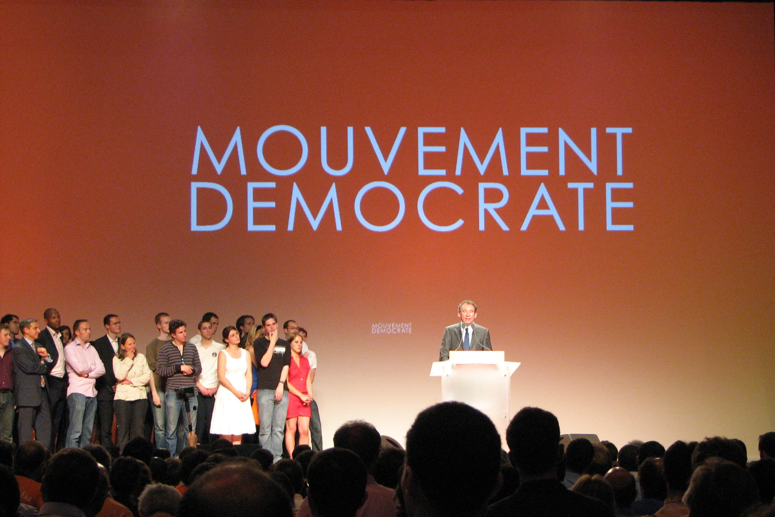 François Bayrou lors du premier meeting du Mouvement démocrate au Zénith de Paris le 24 mai 2007. François Bayrou during the first new party Democratic Movement meeting in the Zénith in Paris May 24th, 2007.